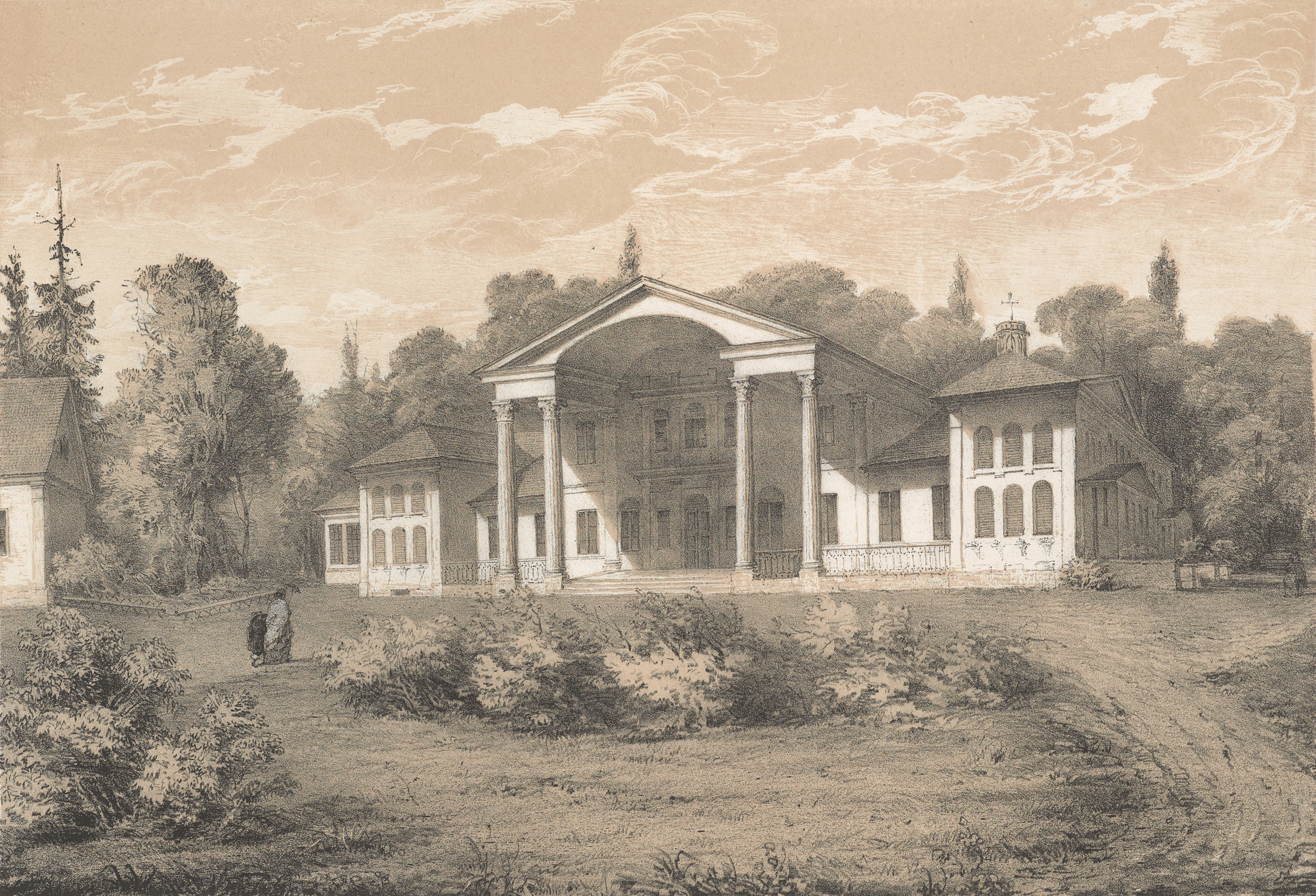 Беларуская (тарашкевіца): Геранімава (Hieranimava), сядзіба Дзяконскіх (Dziakonski)